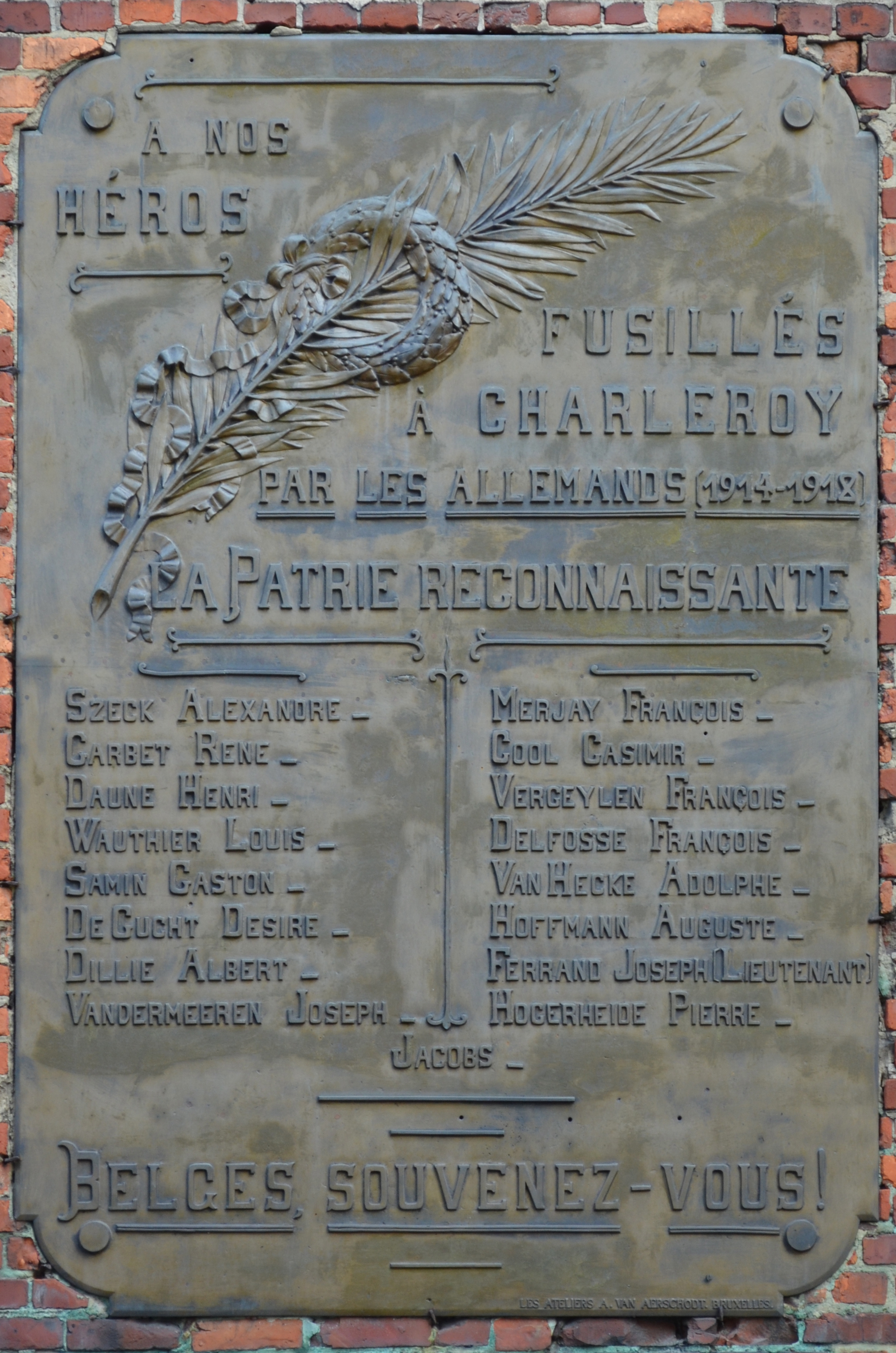 Charleroi (Belgique) - Boulevard Mayence - Plaque en mémoire des fusillés de 1914-1918. Texte : A nos héros fusillés à Charleroy(1) par les Allemands (1914-1918) La Patrie reconnaissante Szeck Alexandre Carbet René Daune Henry Wauthier Louis Samin Gastin De Gucht Désiré Dillie Albert Vandermeeren Joseph Merjay François Cool Casimir Vergeylen François Delfosse François Van Hecke Adolphe Hoffmann Auguste Ferrano Joseph Lieutenant Hogerheide Pierre Jacobs Belges souvenez-vous (1) Tel que sur la plaque. Normalement, depuis 1880, l'orthographe du nom de la Ville est Charleroi.